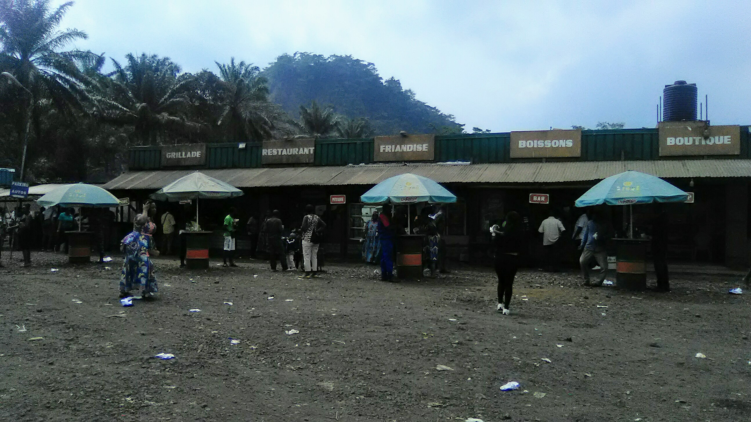 Kutenda Center est situé sur la route nationale numéro 5 reliant Douala aux régions de l'ouest et du nord-ouest. C'est un lieu de repos pour tout voyageur empruntant cet axe routier où il y a bien sûr à manger et à boire: viandes de porc, chèvre, mouton, bœuf, banane plantain, brunchs, jus de fruits naturel, fruits comme ananas, papaye, boissons gazeuses, bières, liqueurs et vins. On y trouve aussi des toilettes publiques. Bakakté fait partie de la périphérie de la ville de Manjo. This is an image with the theme "Africa on the Move or Transport" from: Cameroon